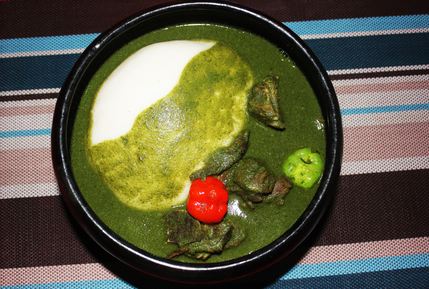 Un bon plat béninois d'igname pilée à la sauce tchayo This is an image of food from Benin